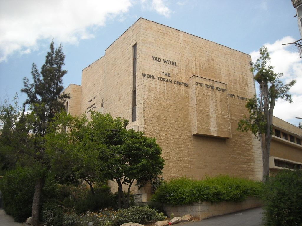 Mercaz HaRav